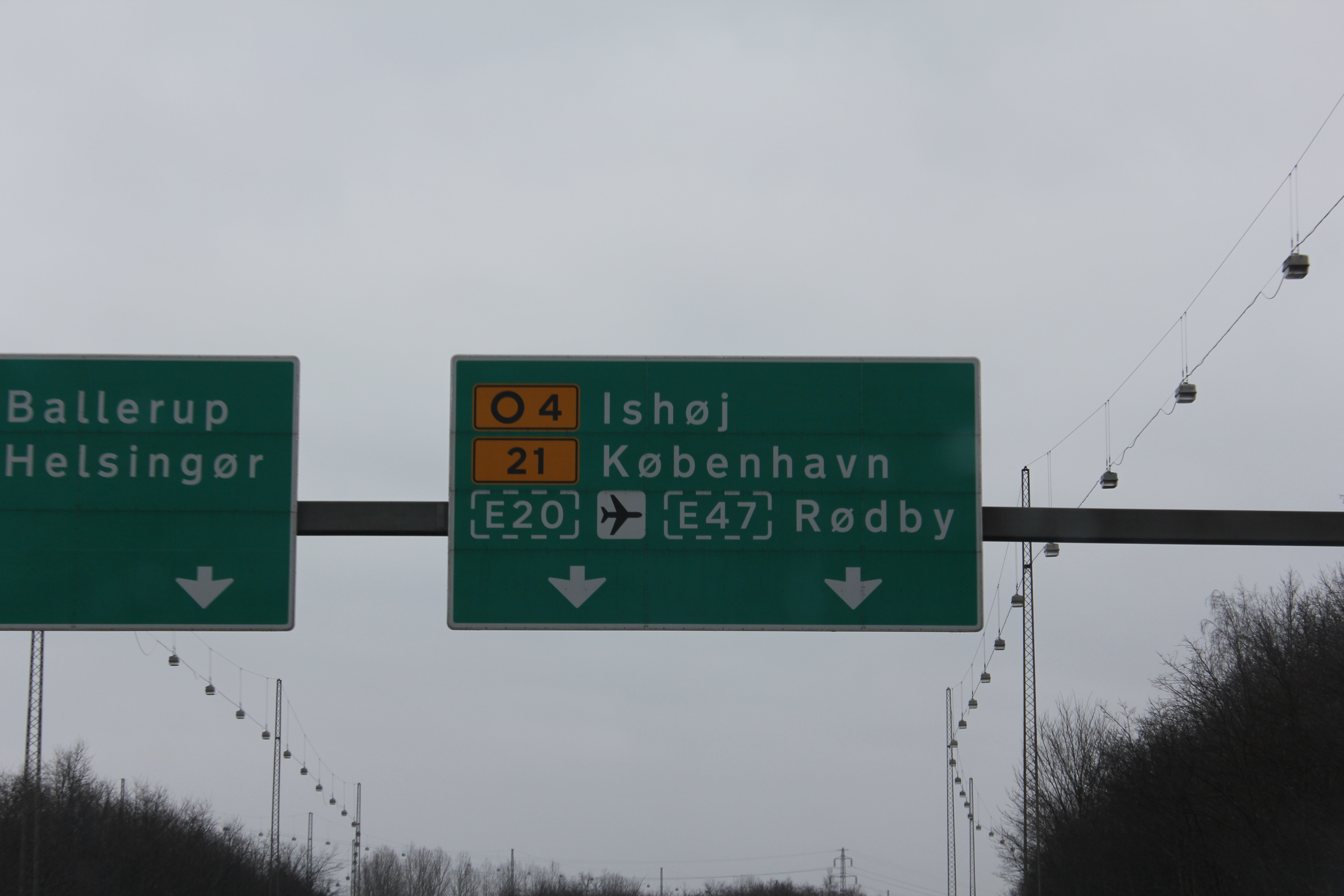 Motorvejsskilt på Holbækmotorvejen mod København